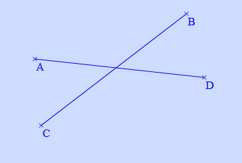 France